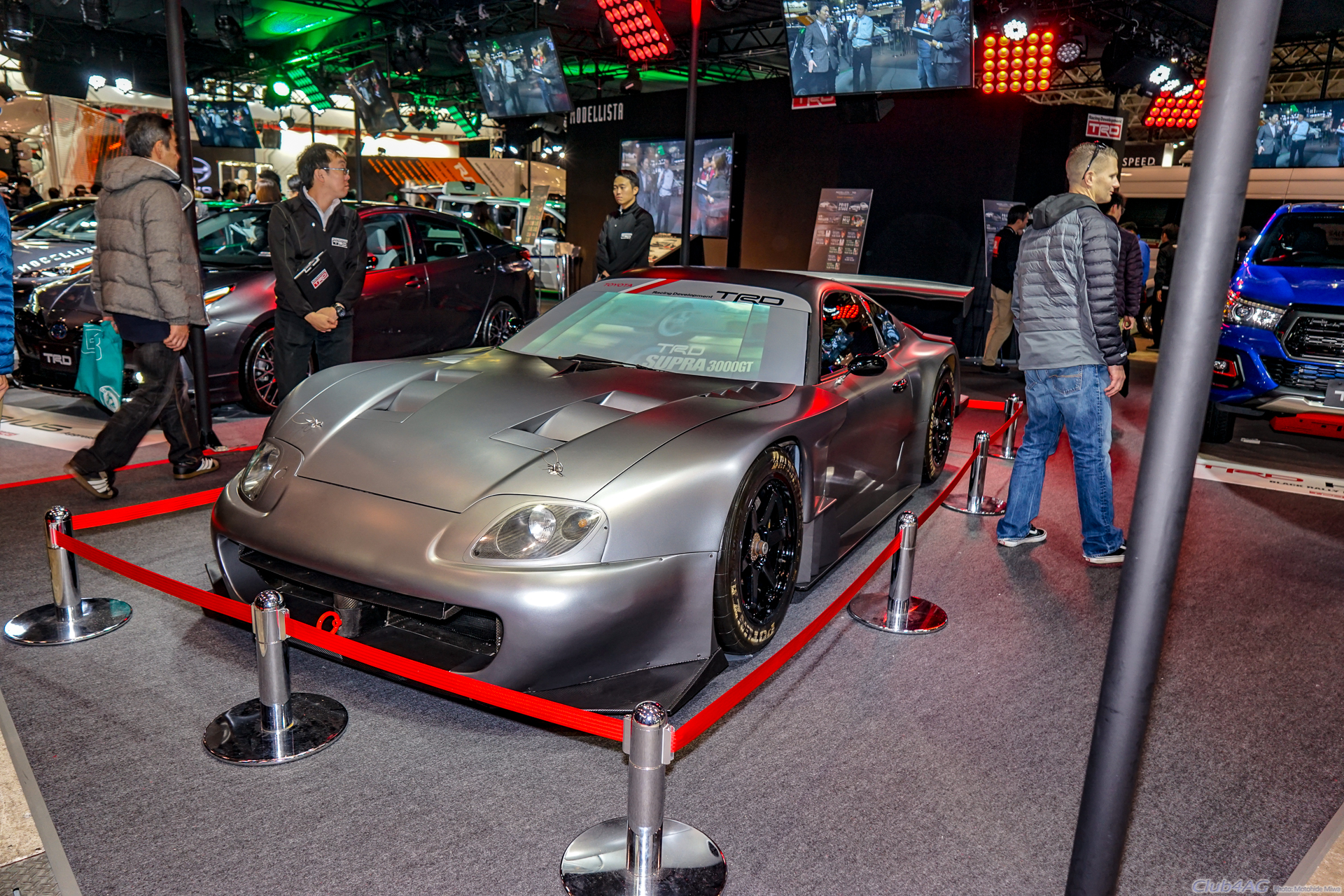 Tokyo Auto Salon 2019